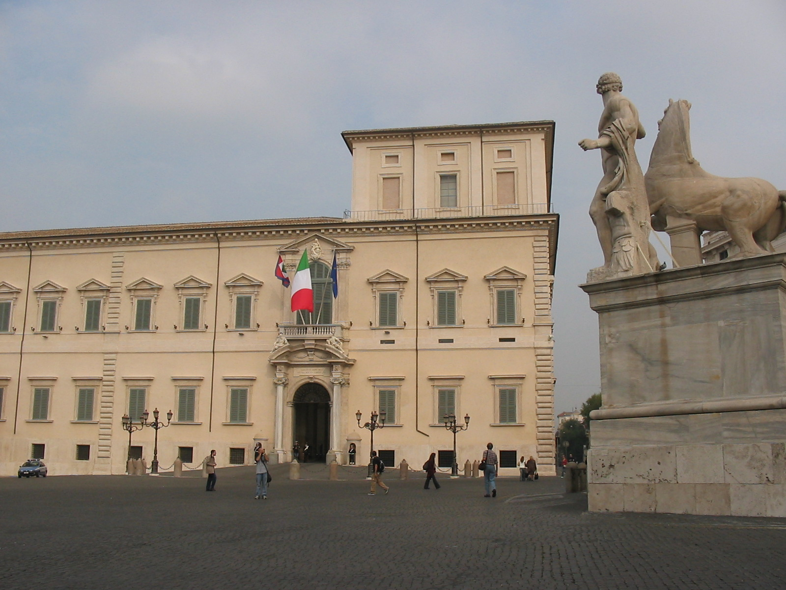 Palazzo Quirinale, Roma / Rome, Italia / Italy